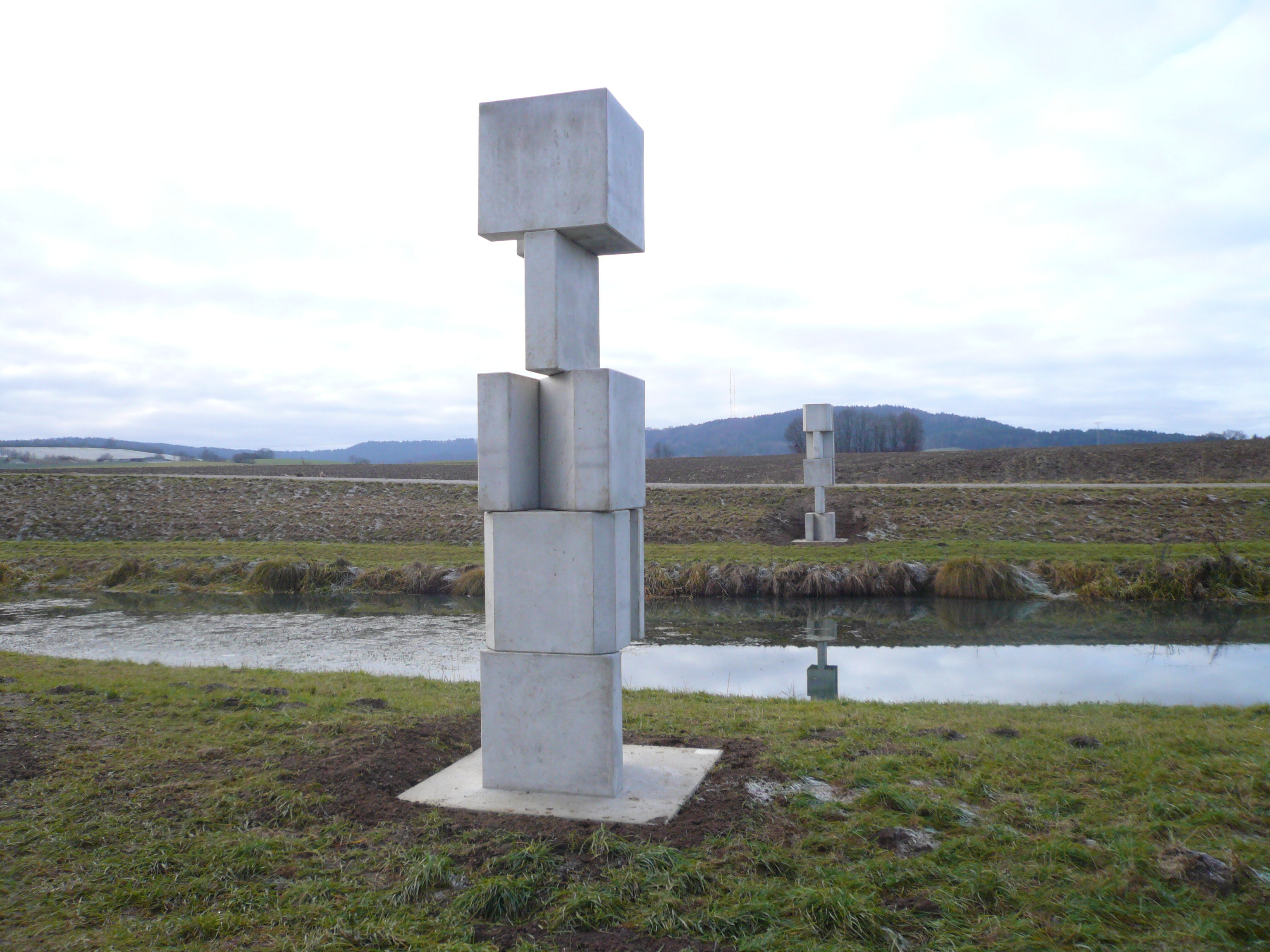 Kunstwerk von Timm Ulrichs, Titel: EINST STEIN am Ludwigkanal